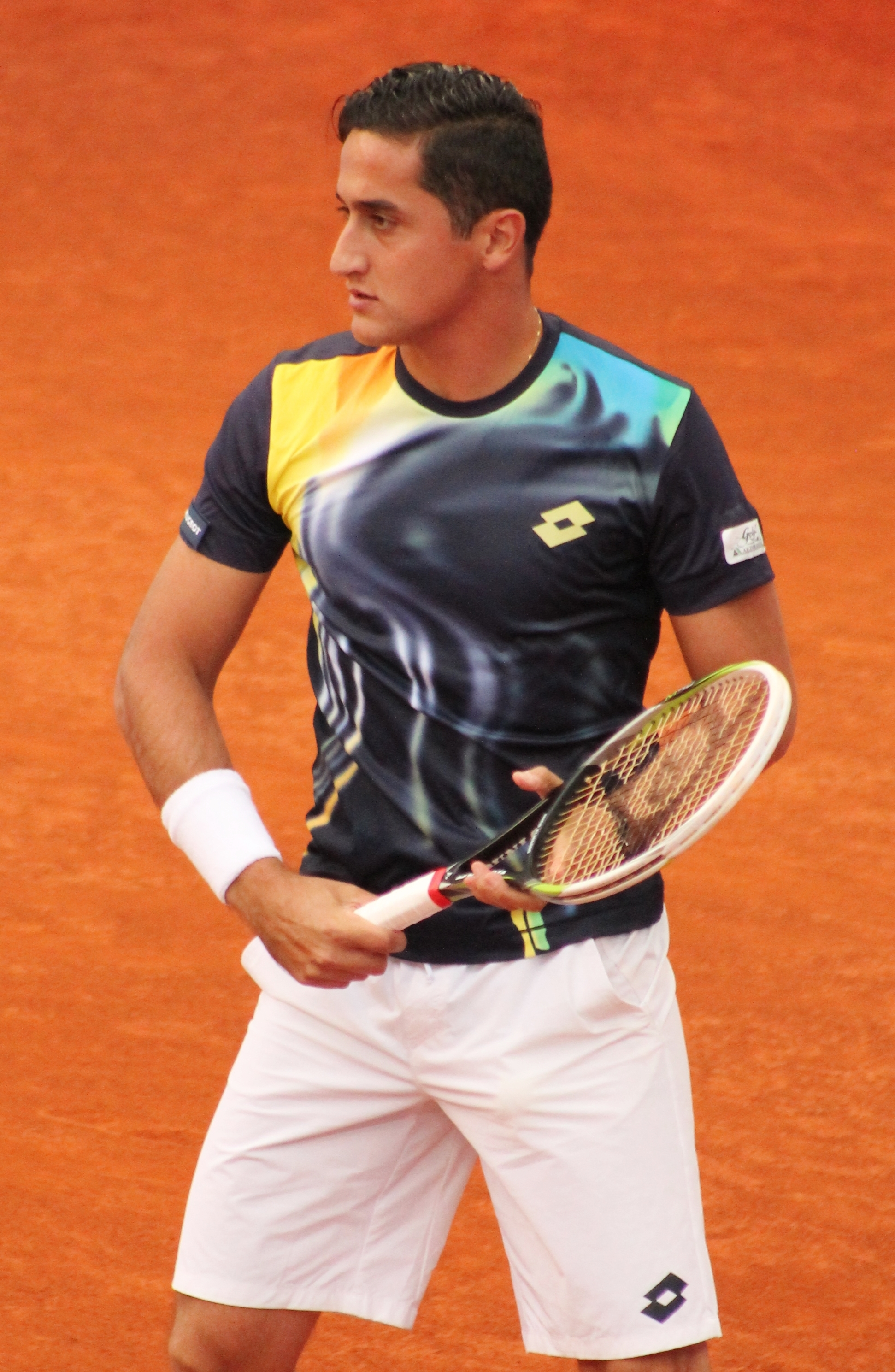 Almagro MA14 (3)